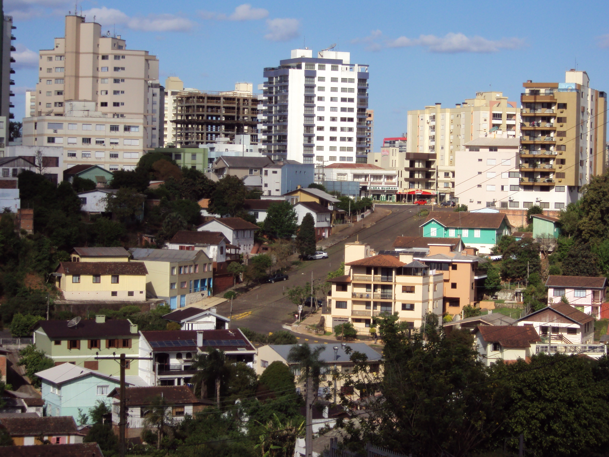 Centro em Erechim, no Brasil.